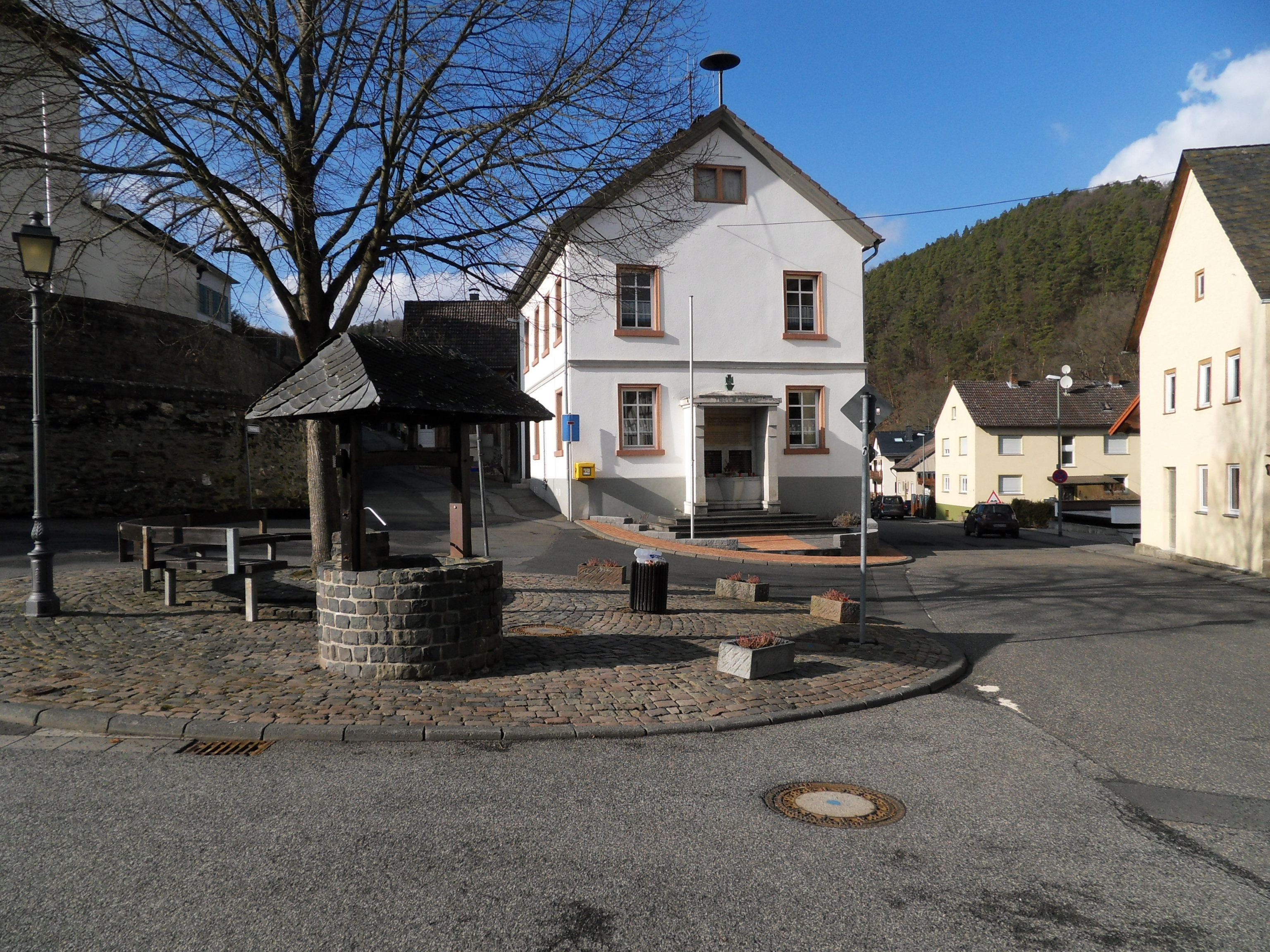 Denkmalgeschützte Alte Schule Holzweg1 mit dem Brunnen auf dem Platz in der Ortsmitte von Niedergladbach im Taunus, Gemeinde Schlangenbad, Blick von Süden